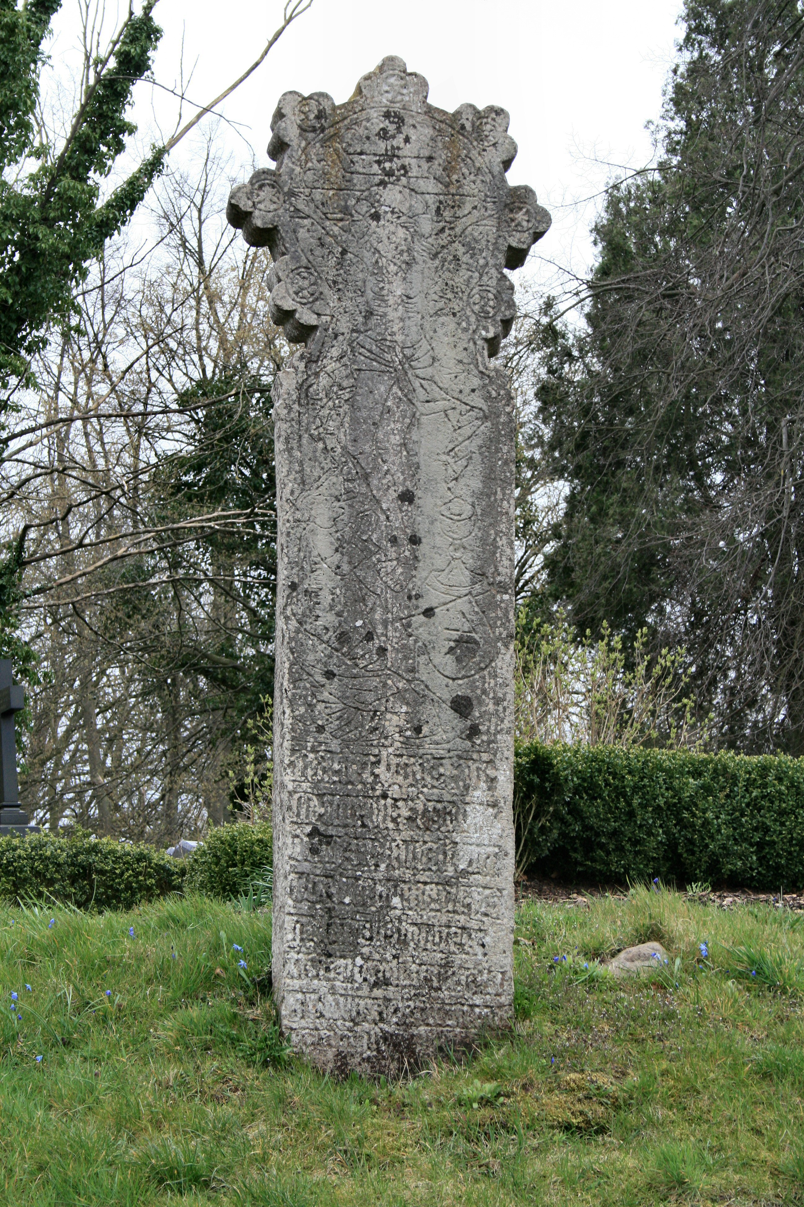 Der Sühnestein (Mordwange) von 1510 in Gustow auf Rügen